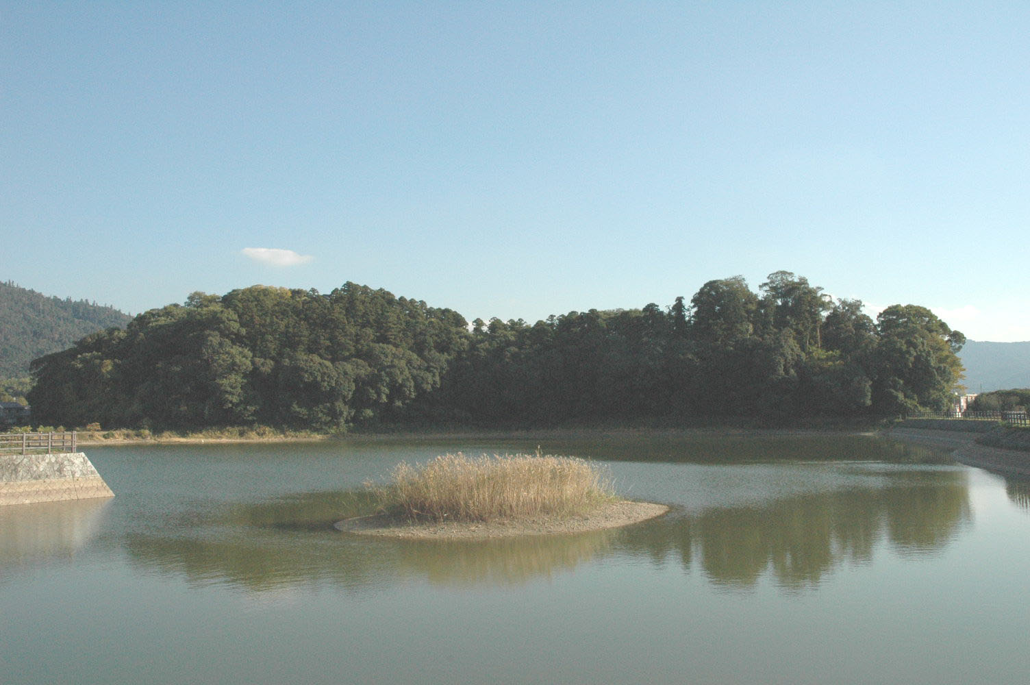 投稿者が2006年11月17日撮影。 名称：箸墓古墳（倭迹迹日百襲姫命大市墓） 所在地：奈良県桜井市箸中